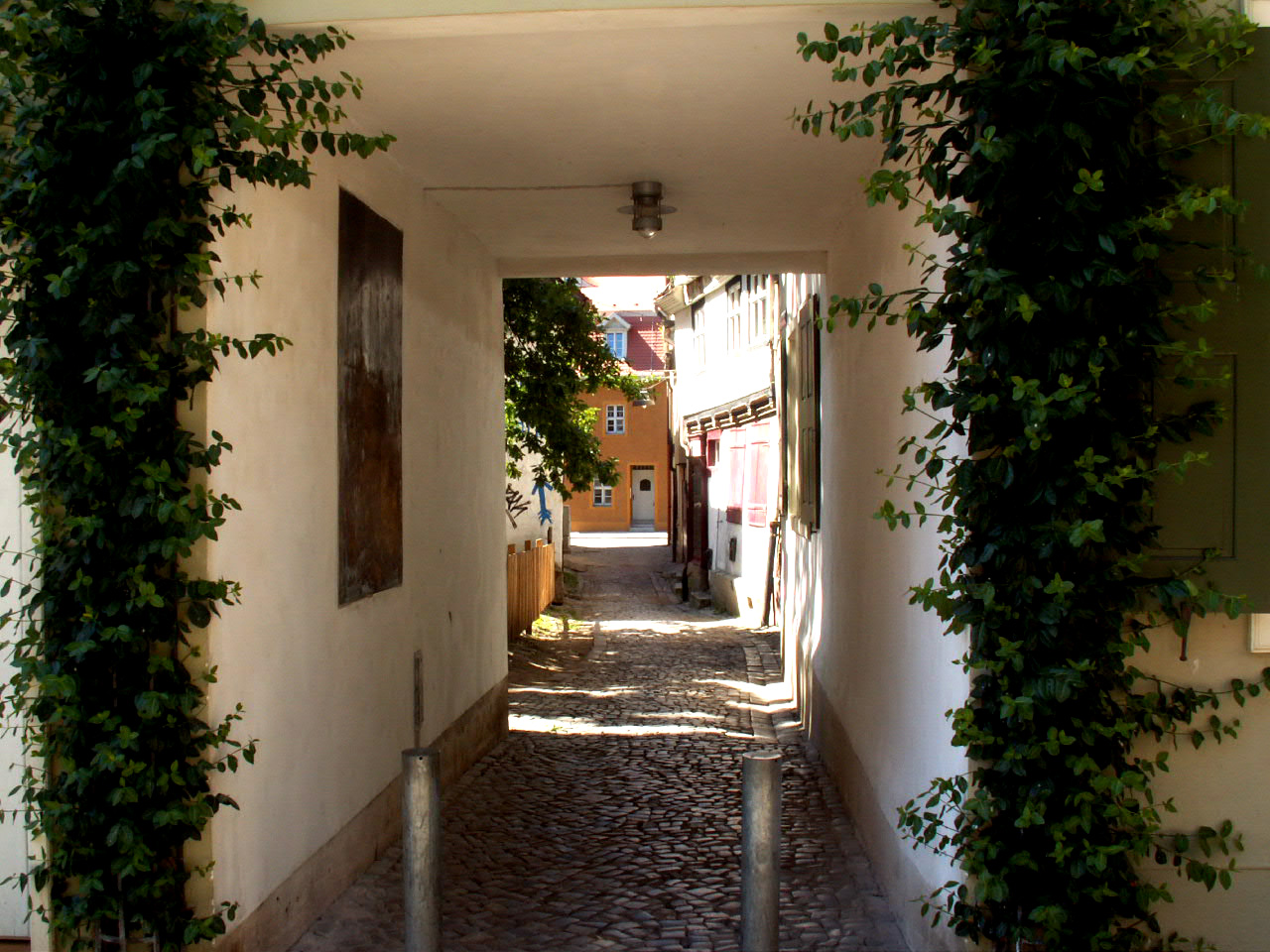 der Halken in Aschersleben